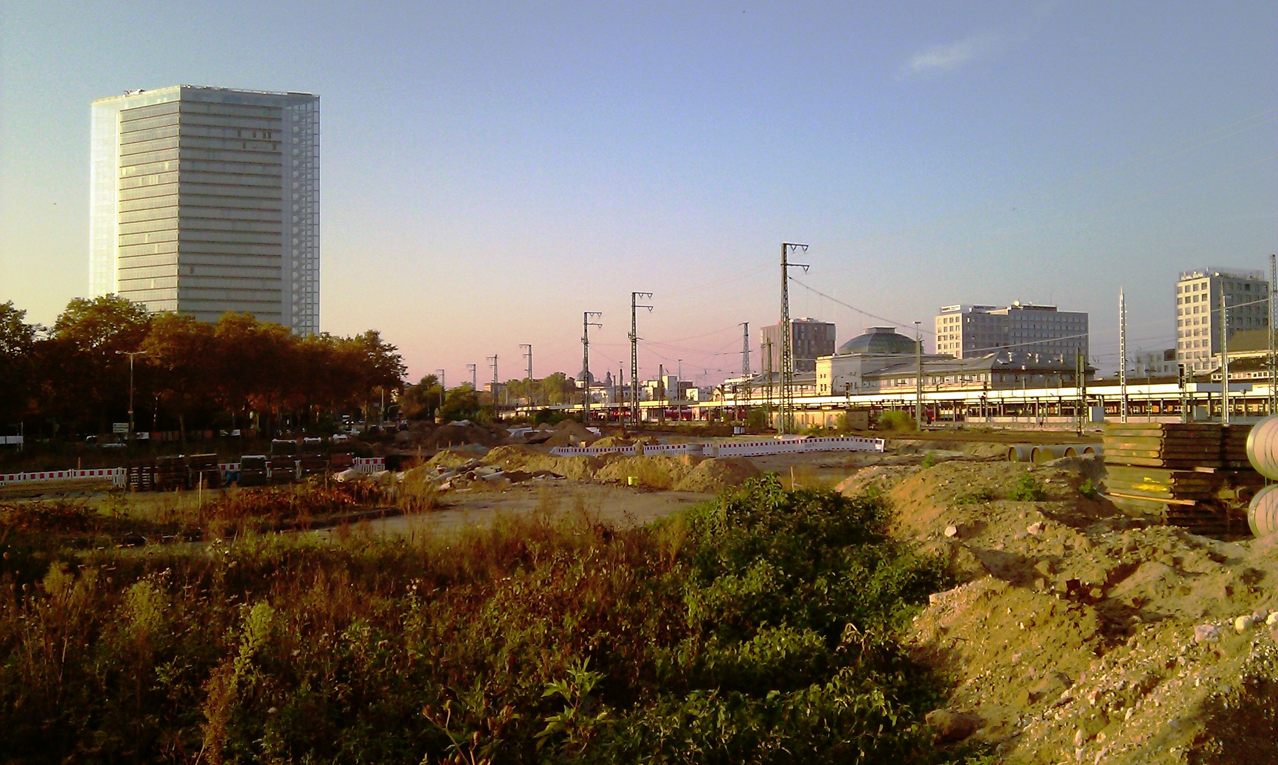 Baustelle "Mannheim 21"